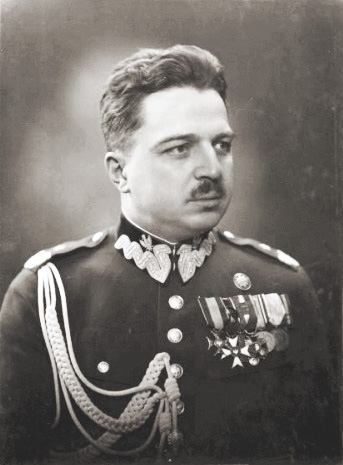 Gen. bryg. Czesław Jarnuszkiewicz - dowódca Okręgu Korpusu nr I, portret w mundurze.